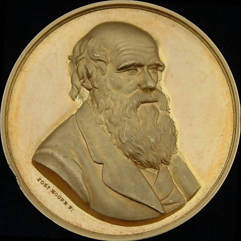 Медаль имени Чарлза Дарвина